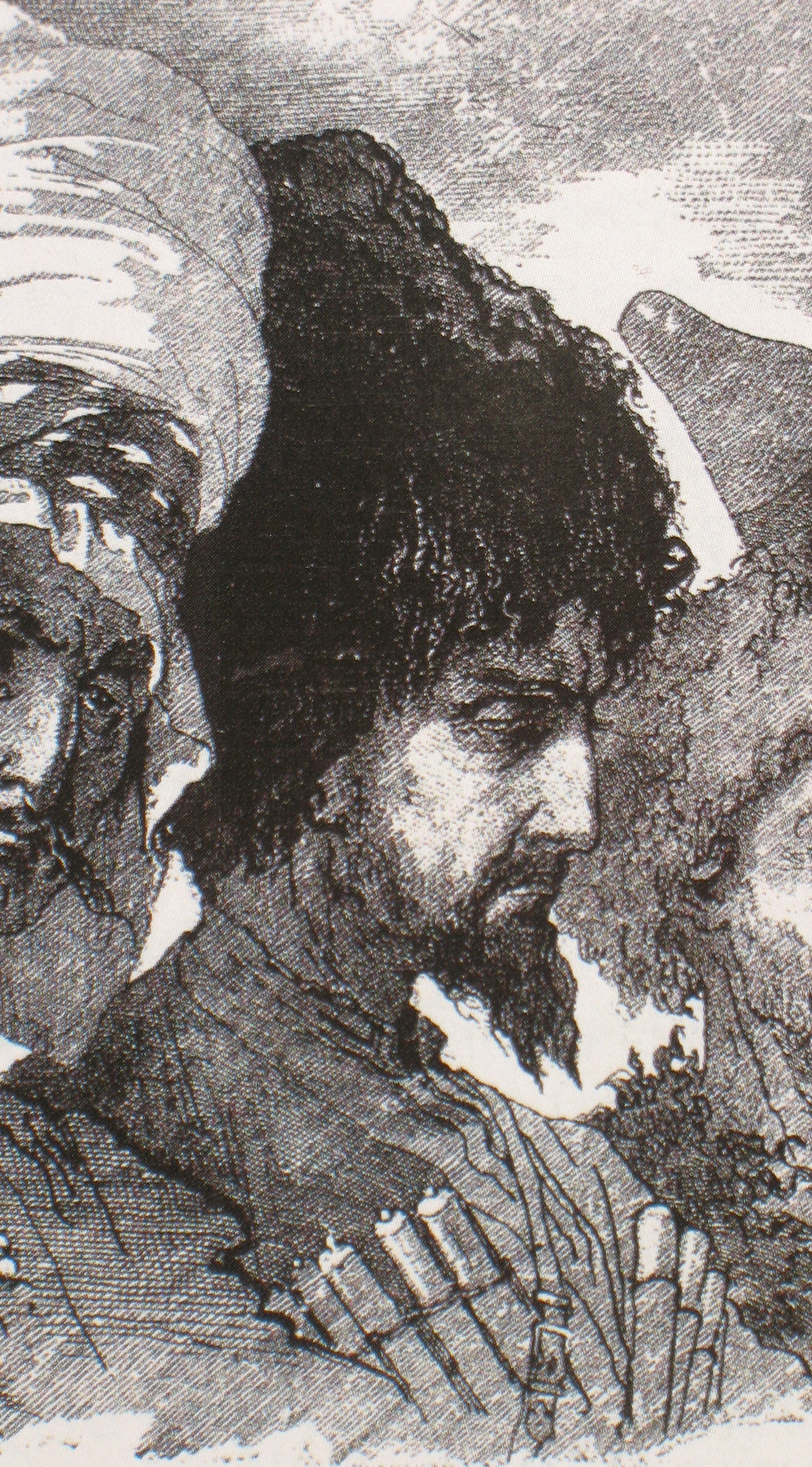 Микешин Типы Кавказа 1876. Кабардинец